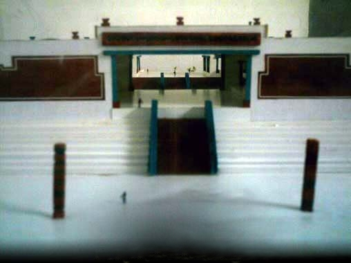 Rolandhwx